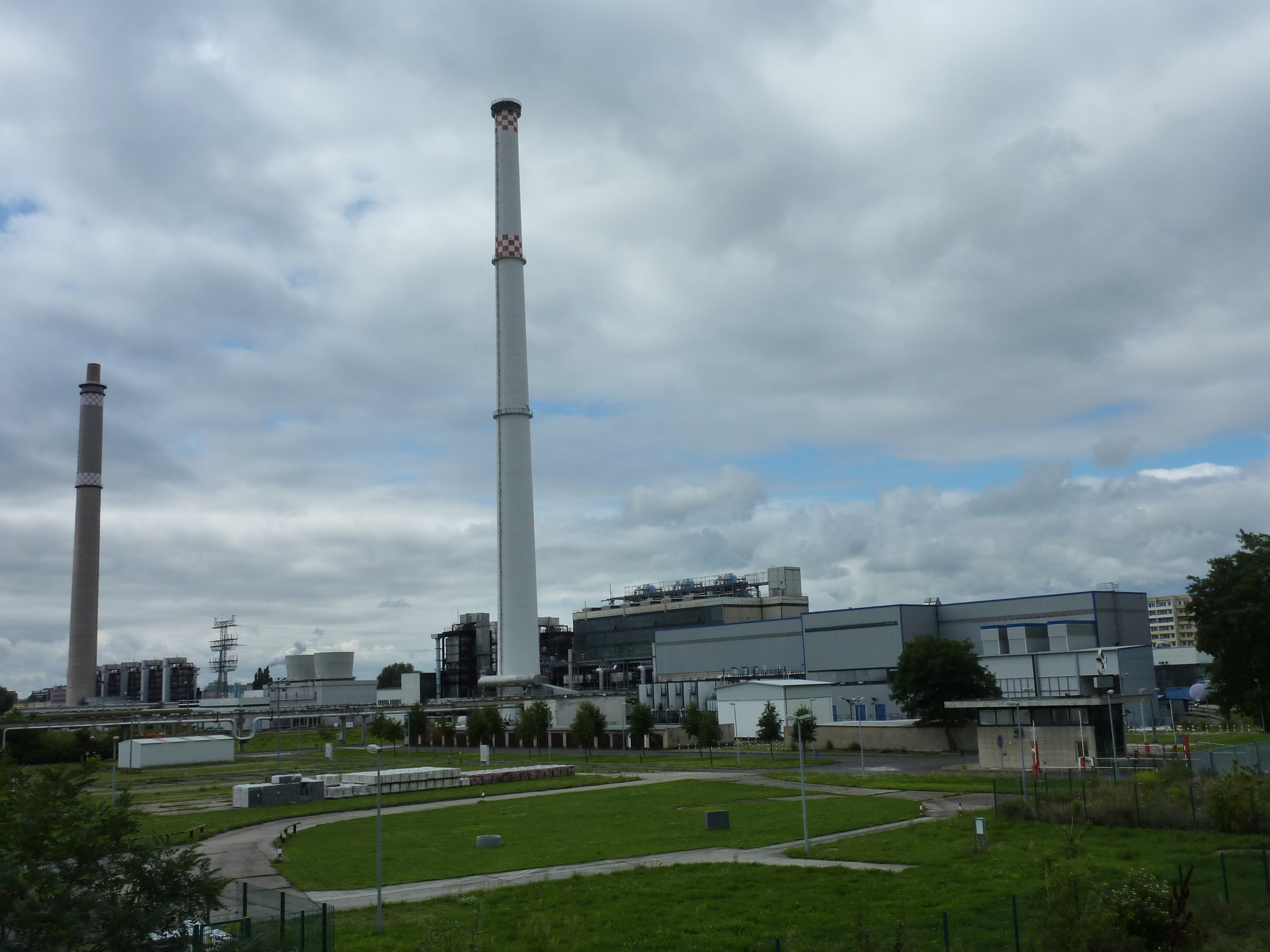 Heizkraftwerk Lichtenberg in Berlin-Marzahn, gesehen von der Allee der Kosmonauten aus; Blickrichtung Südwesten.